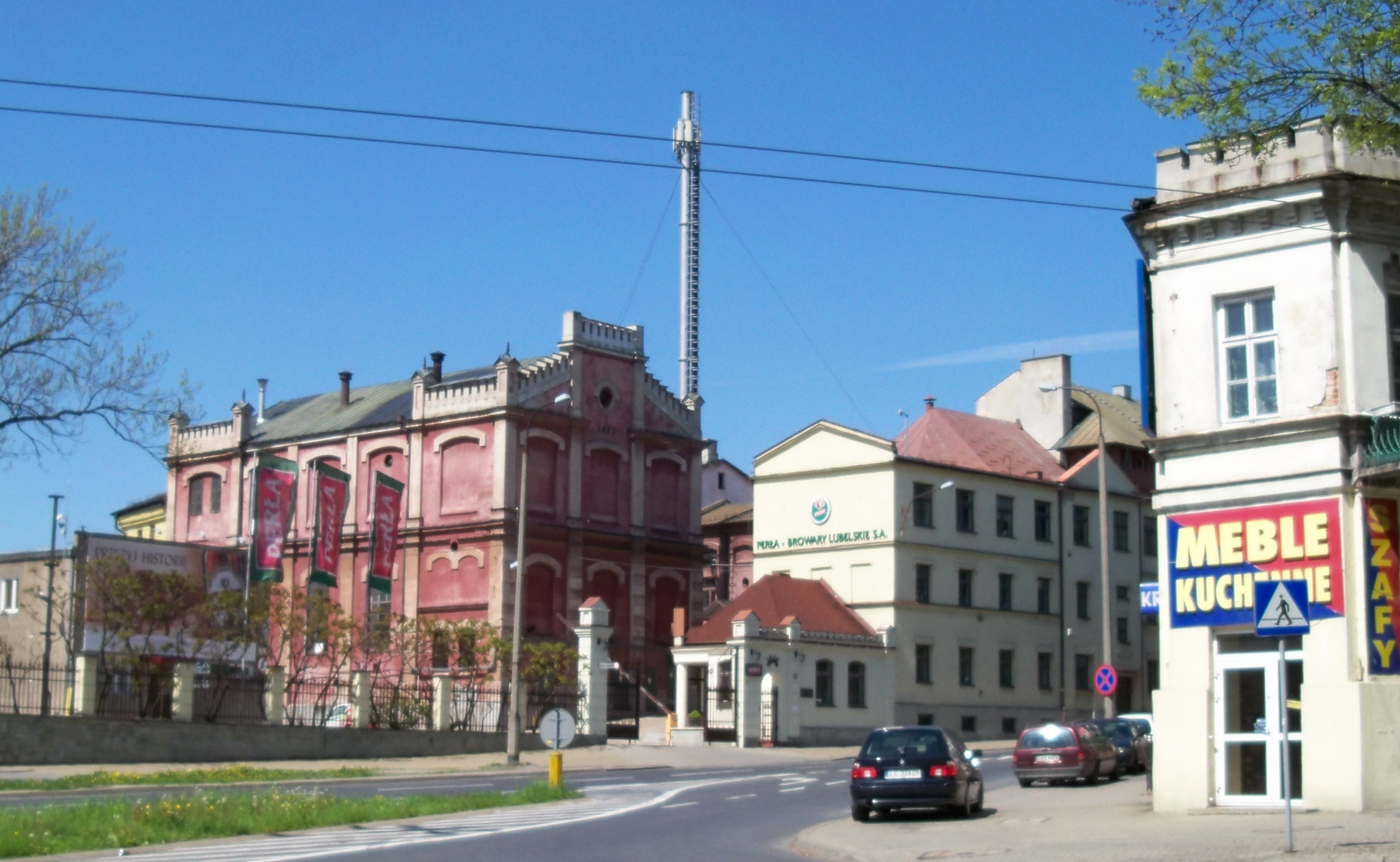 Browary Lubelskie Perła. Róg ul. Bernardyńskiej, Zamojskiej i Wyszyńskiego w Lublinie.